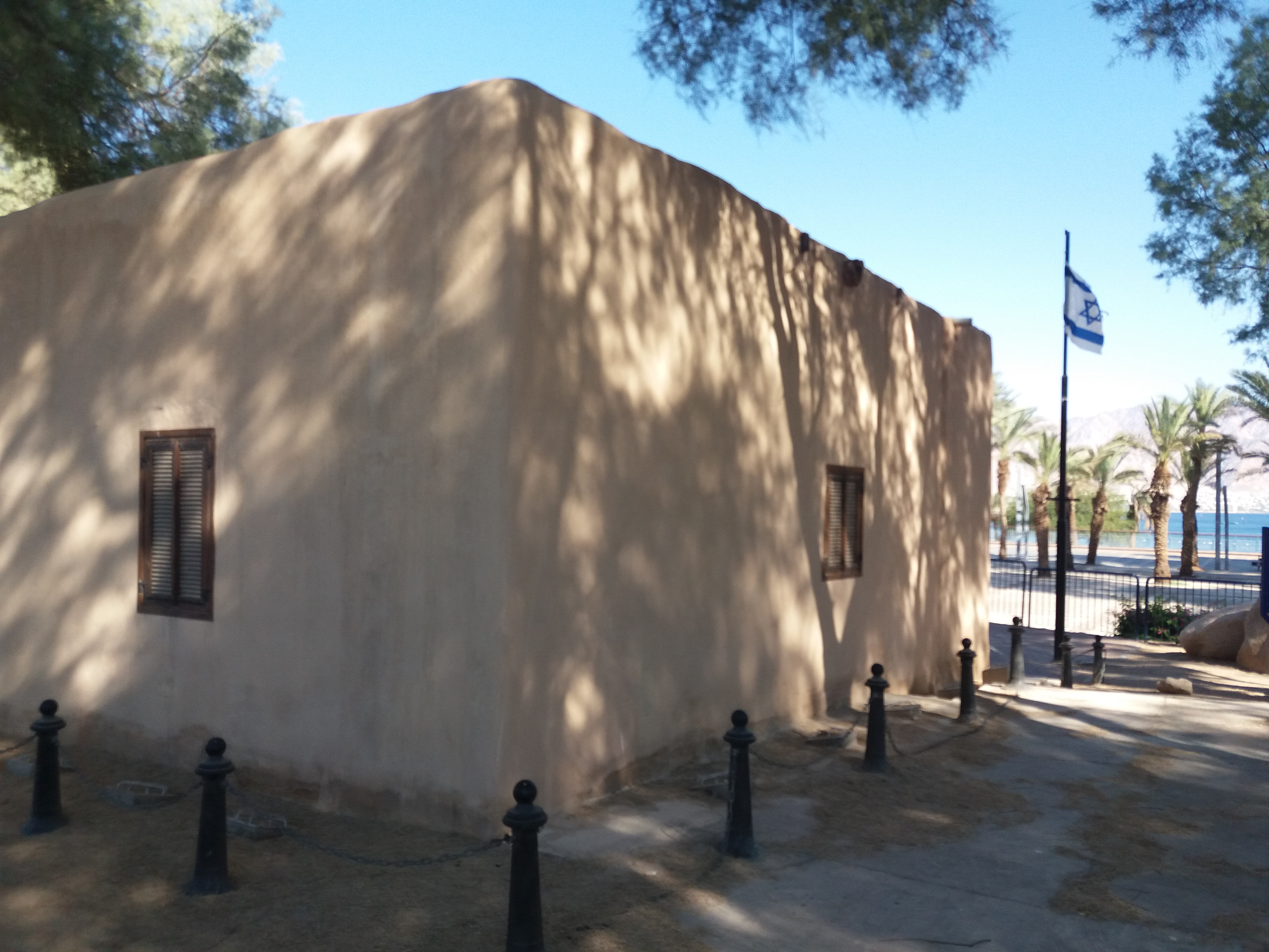 מבנה משטרה בריטי ששכן באום רשרש (אילת) ונכבש על ידי צה"ל במלחמת העצמאות במבצע עובדה. מהמבנים שהיו באתר שרד כיום מבנה אחד, לידו הוצבה אנדרטה המשחזרת את מעמד הנפת "דגל הדיו" במבצע "עובדה".